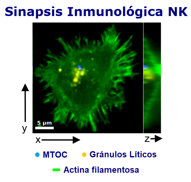 Figura 2 C. La aproximación del gránulo a la membrana sináptica es coincidente con el MTOC y la red de actina. Una sinapsis inmunológica de célula NK. La imagen demuestra las localizaciones de las proteínas: pericentrina (en azul), perforina (en amarillo), y actina (en verde). En el margen izquierdo se muestra la proyección de la célula en el eje Y. El margen inferior muestra el eje X, y el eje Z (profundidad). La célula NK-92 fue activada sobre vidrio, fijada, teñida, y mostrada mediante microscopía confocal y microscopía TIRF.